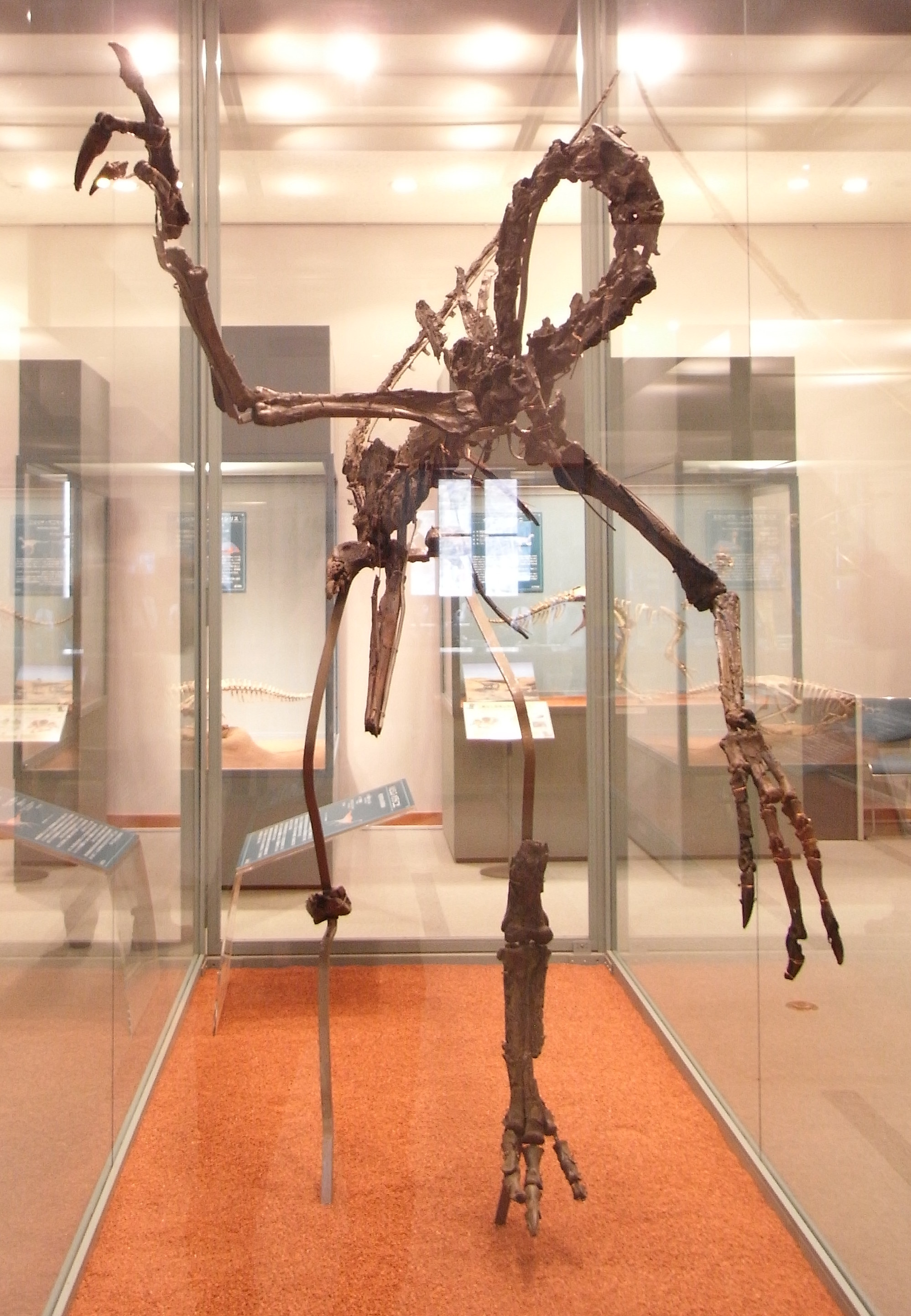 首反りすぎ。 いや、なんかポーズが遊びすぎでしょう。 でも見つかった時こうなってたから仕方ない。